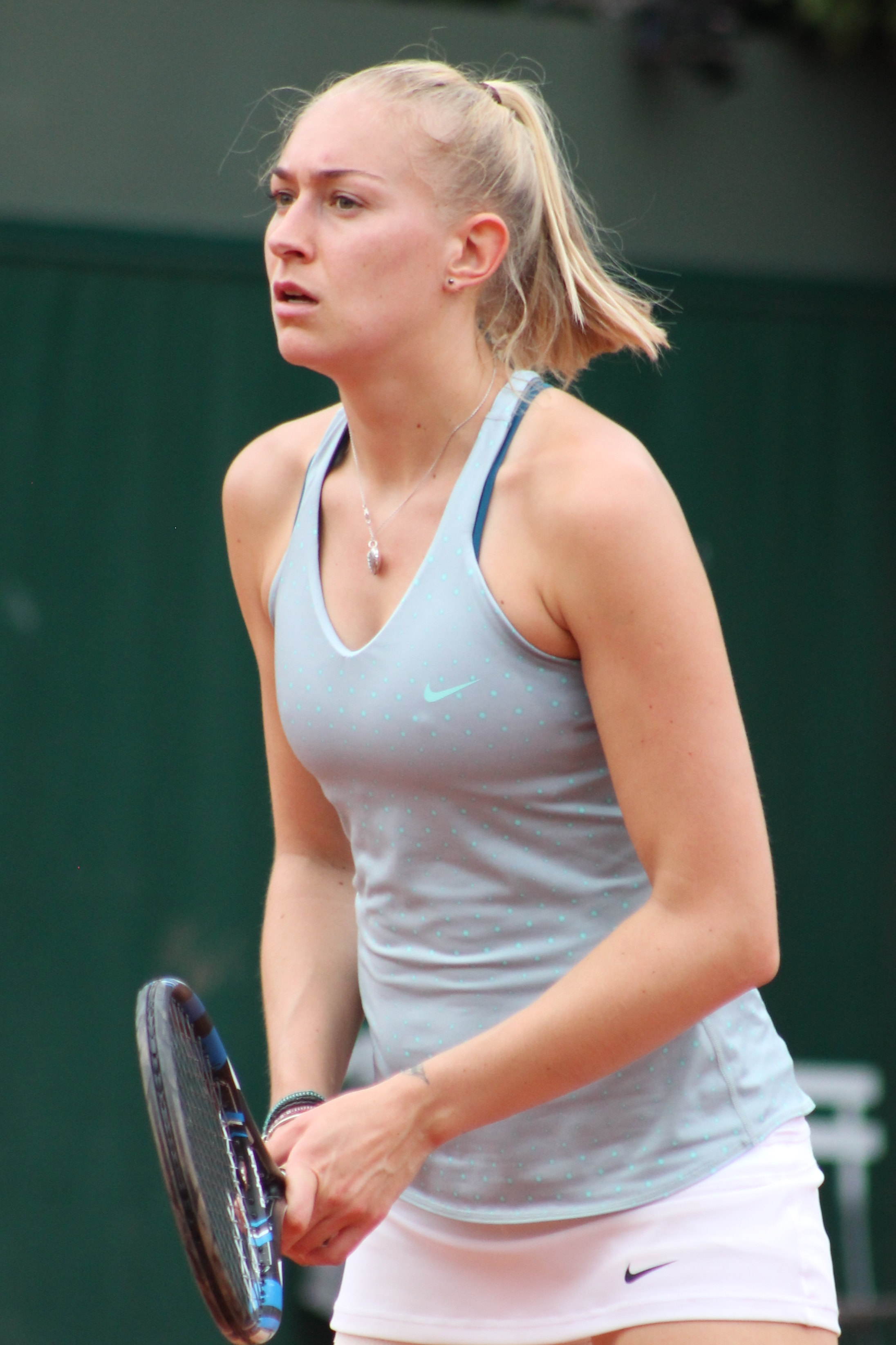 Rae RG16 (4)